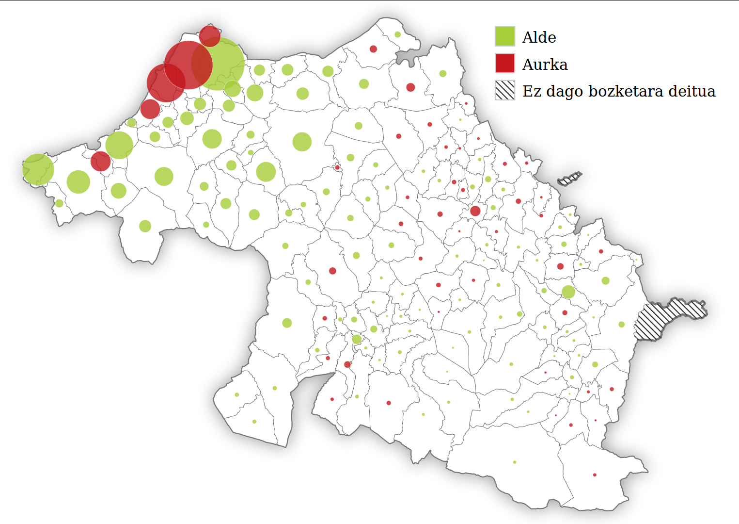 ARGIA.eus-erako egin nuen infografian oinarritua